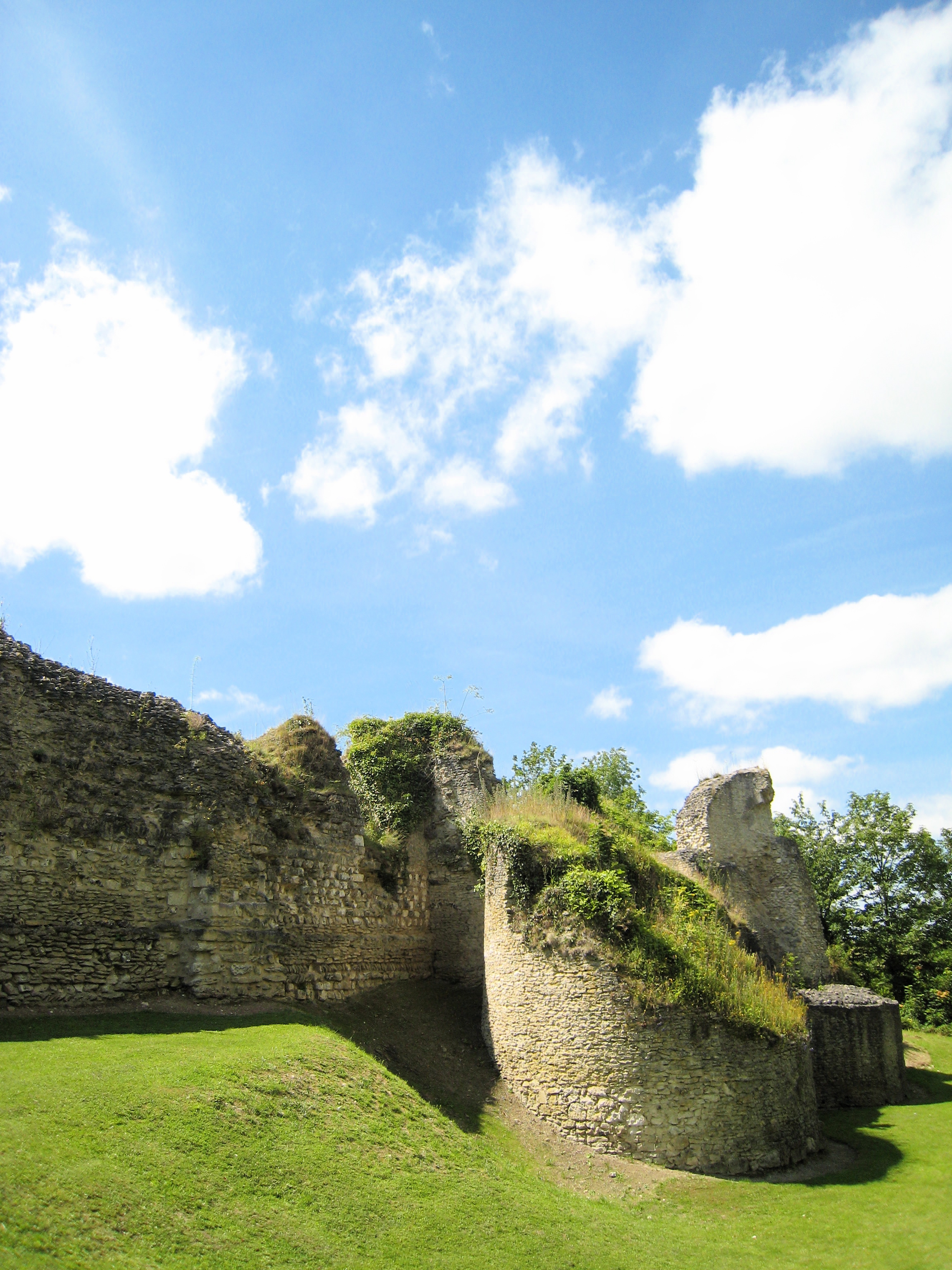 Chatelet d'entrée (XIII° S.) du château d'Ivry la Bataille (Eure, 27, France)